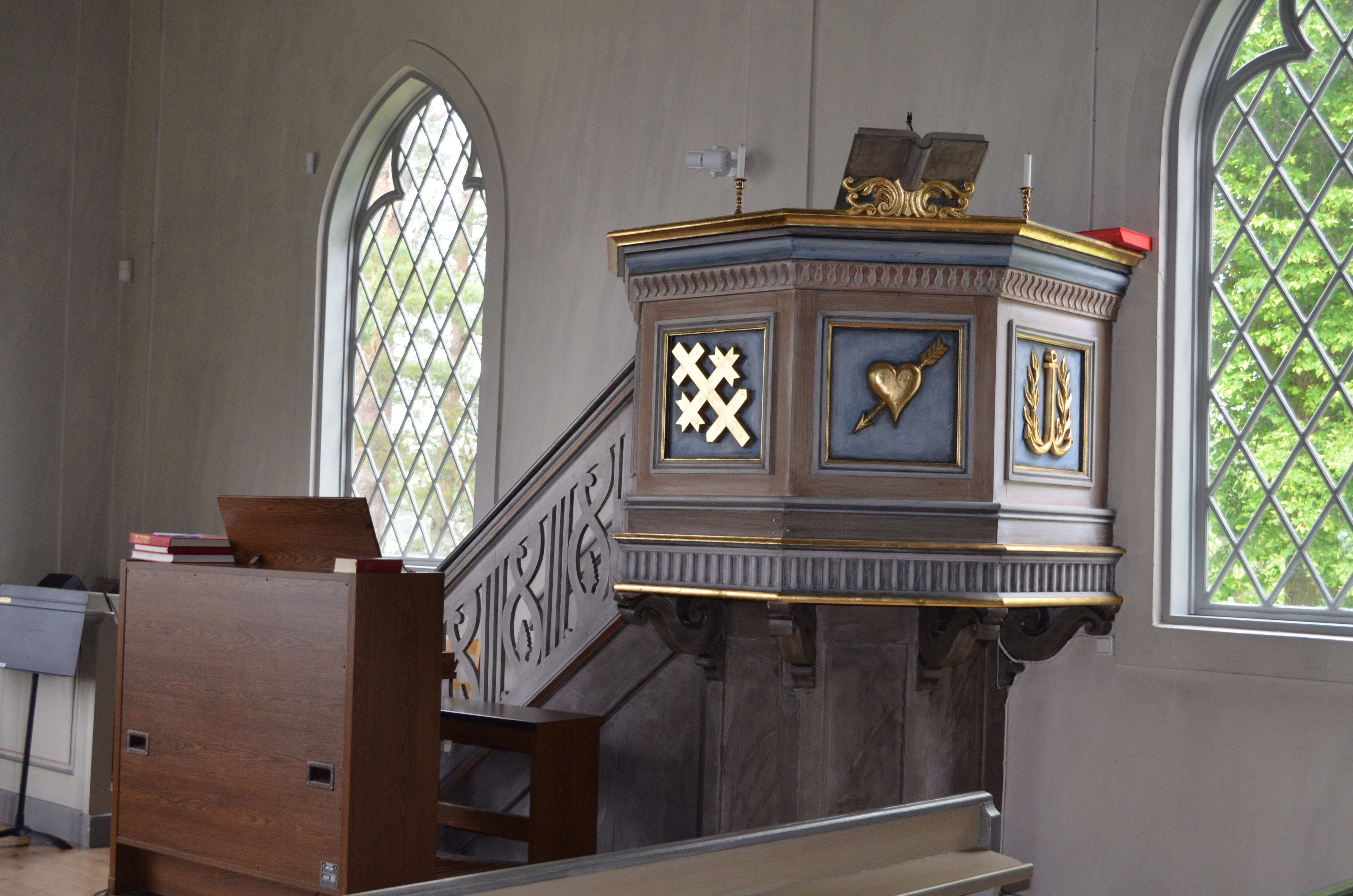 Predikstolen